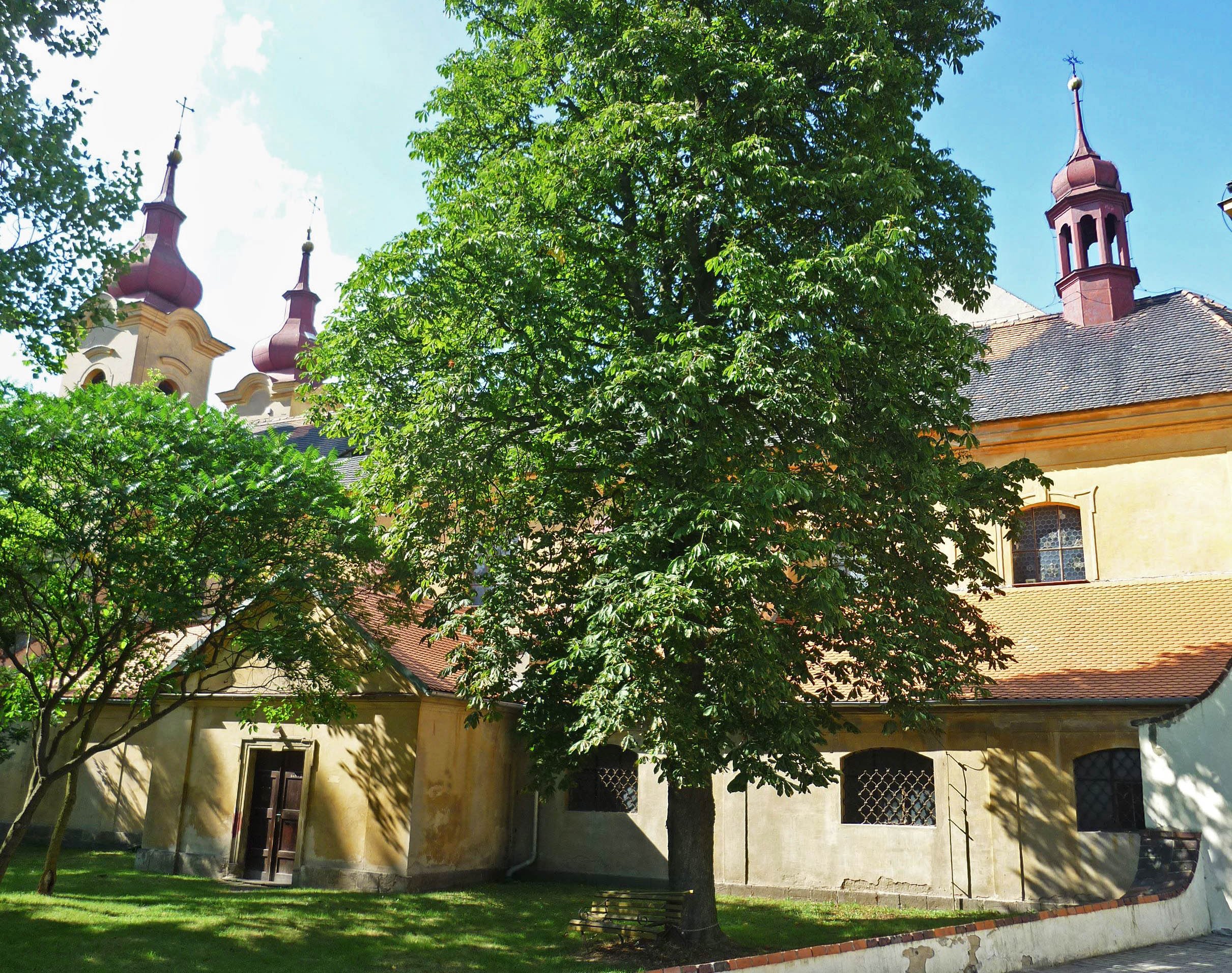 Kirche in Schwaz / Světec in Böhmen